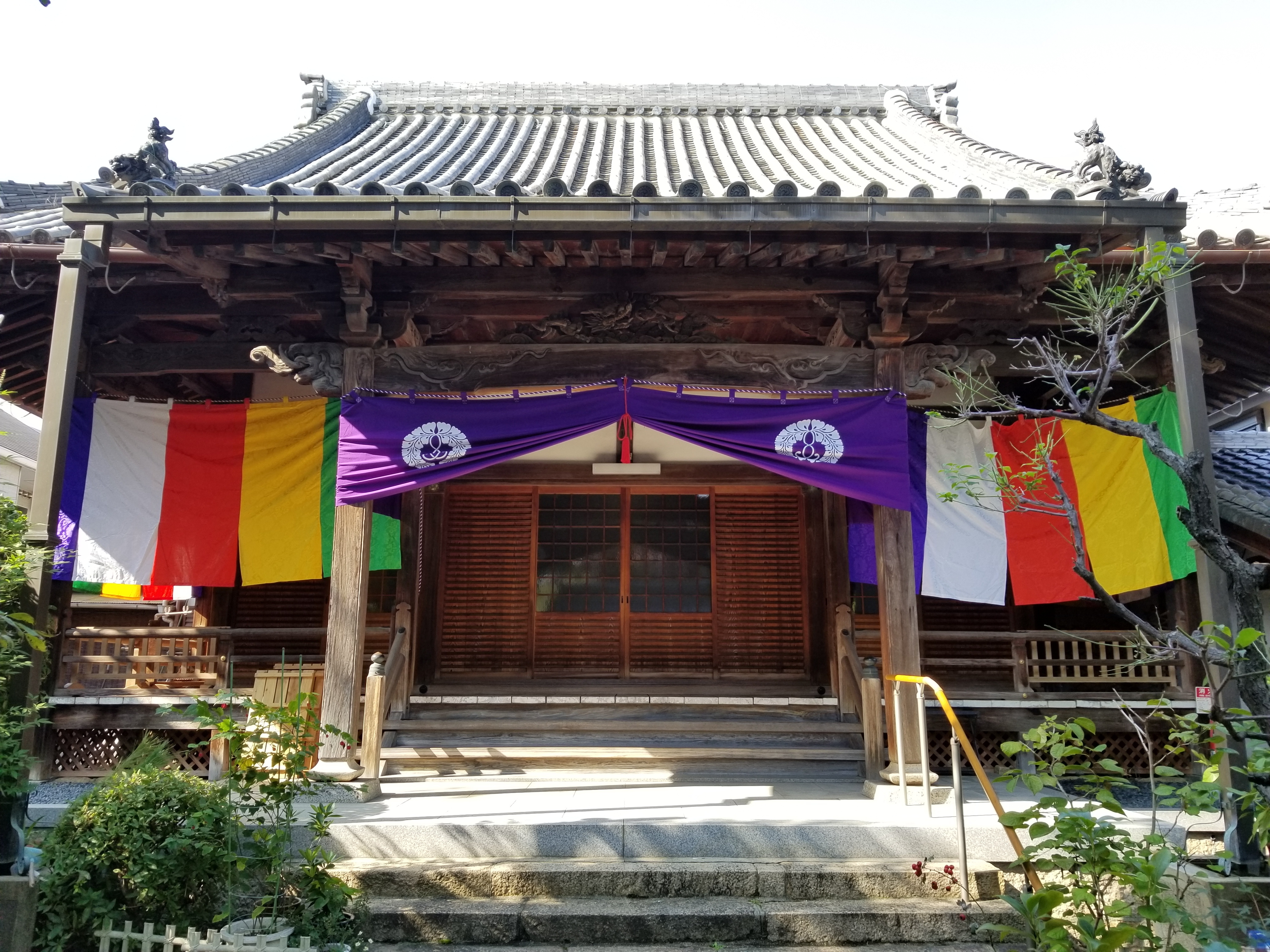 報恩講法要